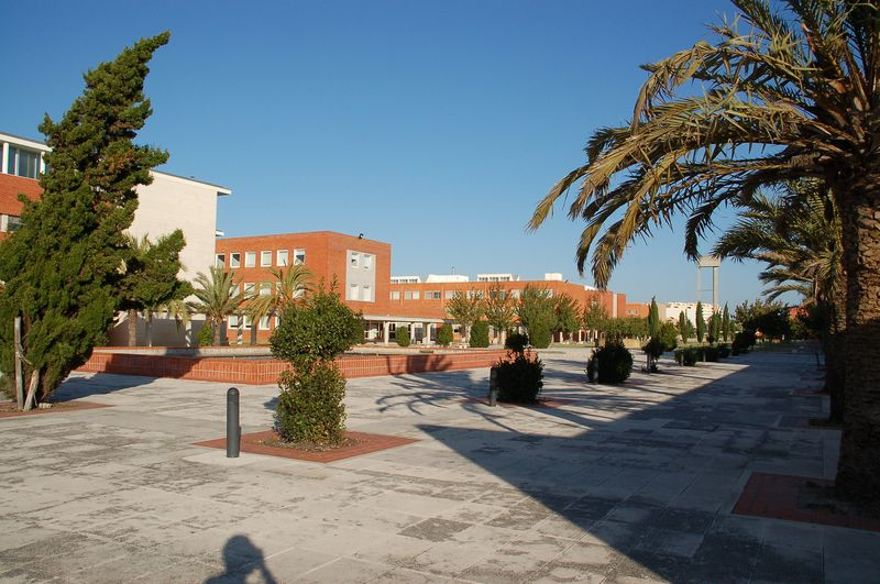 departamentos ua